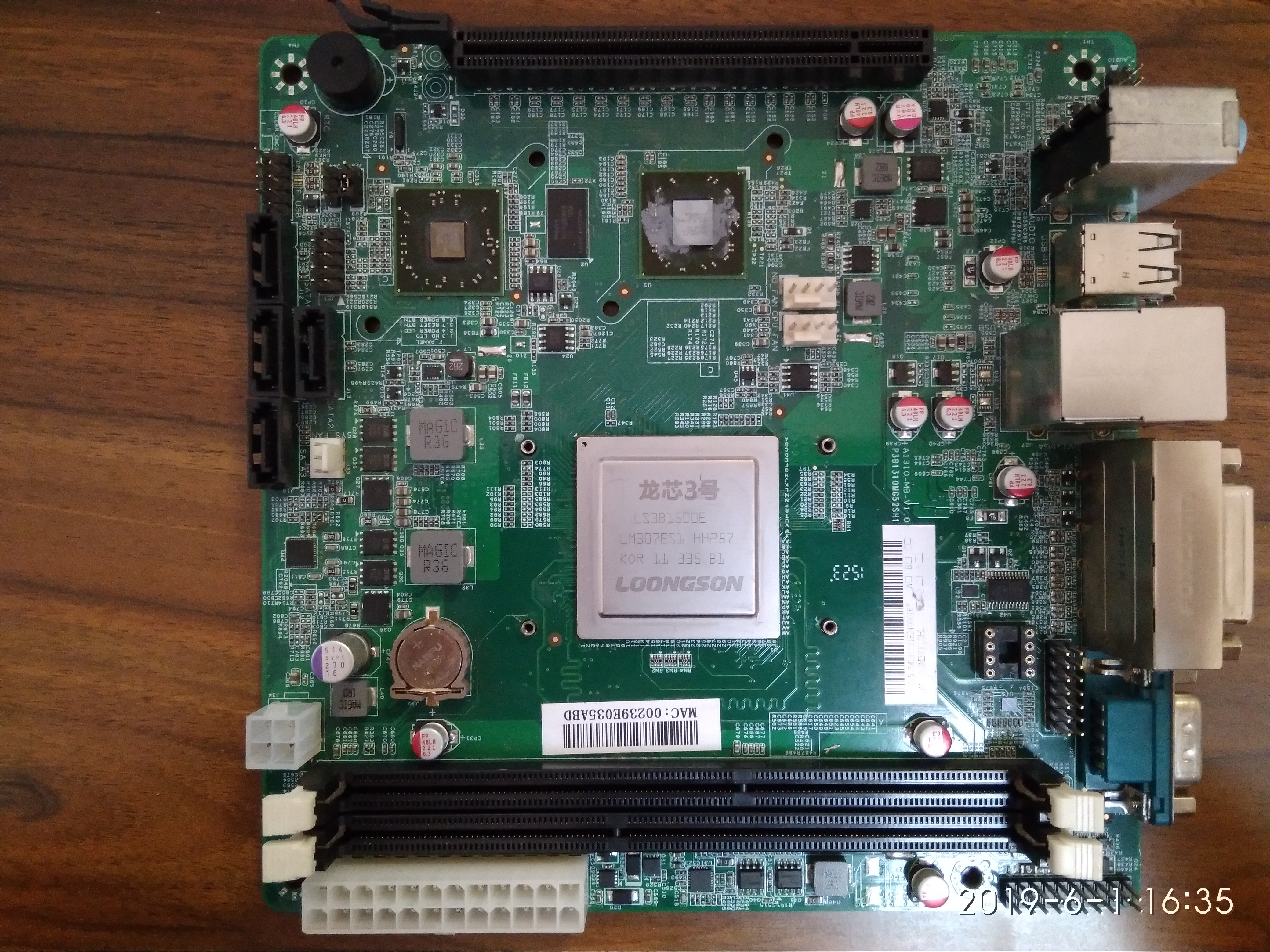 龙梦A1310主板正面照